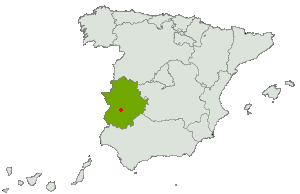 Situación de Mérida en España y Extremadura.